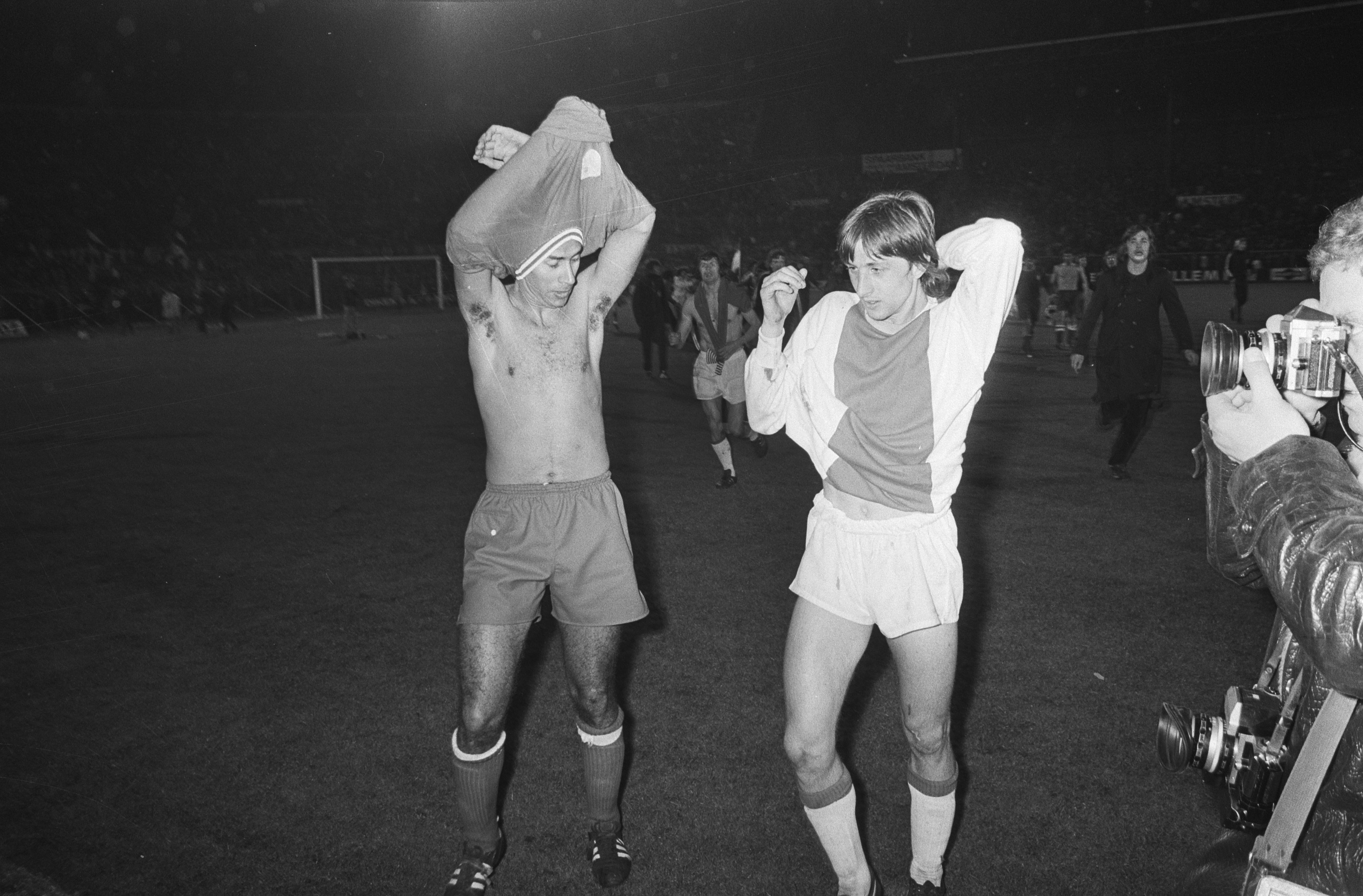 Collectie / Archief : Fotocollectie Anefo Reportage / Serie : Voetbalwedstrijd halve finale Europa Cup 1, Ajax - Atletico Madrid: 3-0 Beschrijving : Na de wedstrijd wisselen Cruijff en een speler van Atletico Madrid van shirt Datum : 28 april 1971 Locatie : Amsterdam, Noord-Holland Trefwoorden : spelers, sport, voetbal Persoonsnaam : Cruijff, Johan Fotograaf : Fotograaf Onbekend / Anefo Auteursrechthebbende : Nationaal Archief Materiaalsoort : Negatief (zwart/wit) Nummer archiefinventaris : bekijk toegang 2.24.01.05 Bestanddeelnummer : 924-5031